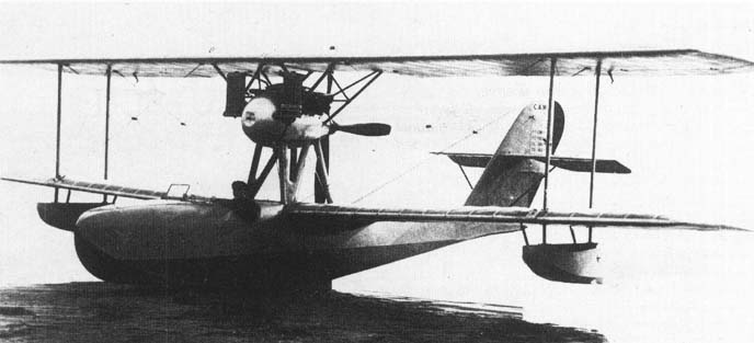 CAMS 30T1923